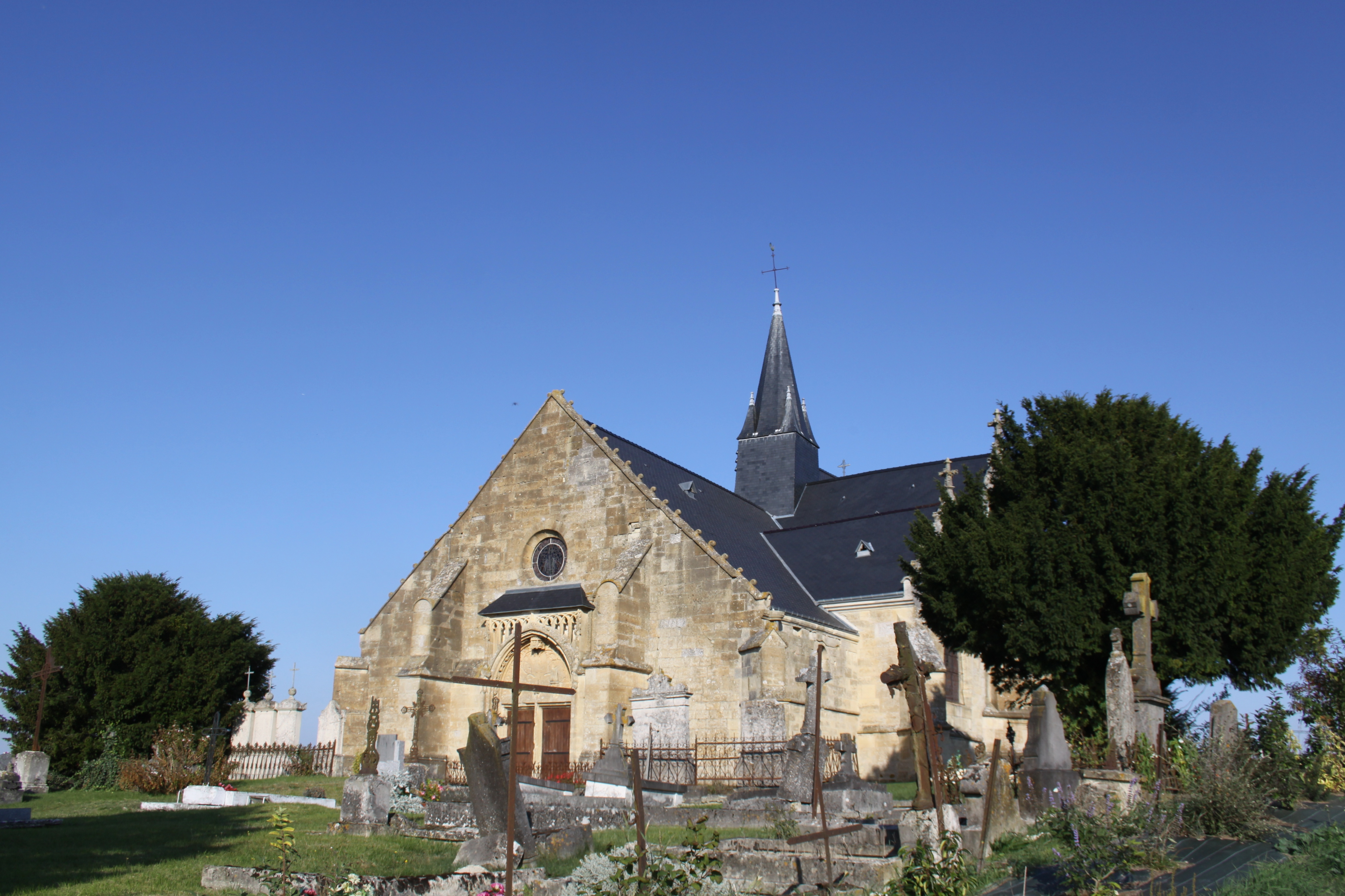 Église Saint-Juvin de Sainte-Vaubourg (Ardennes, France) .